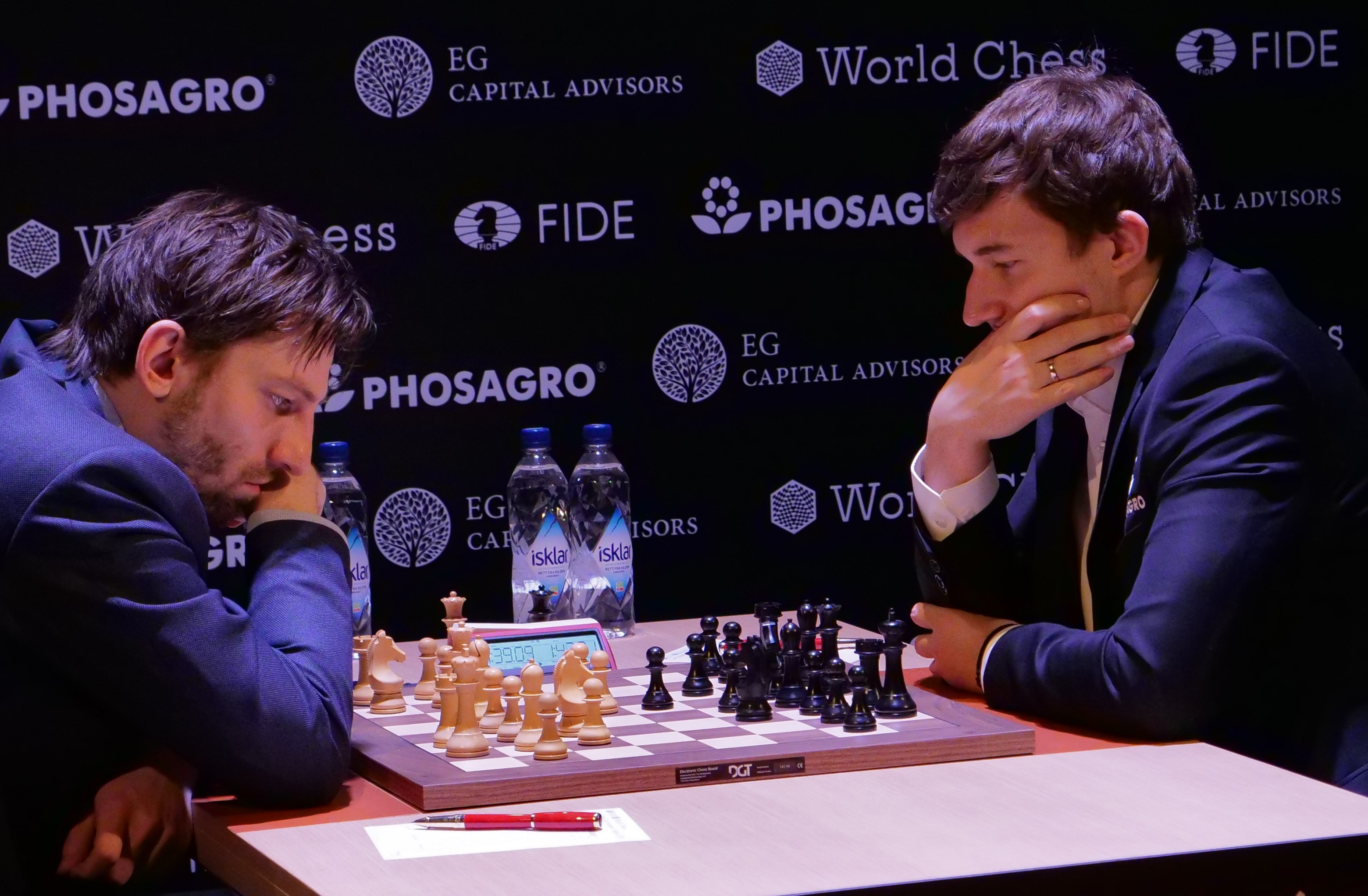 Alexander Grischtschuk (li.) und Sergei Karjakin, Kandidatenturnier Berlin 2018, 10. Runde